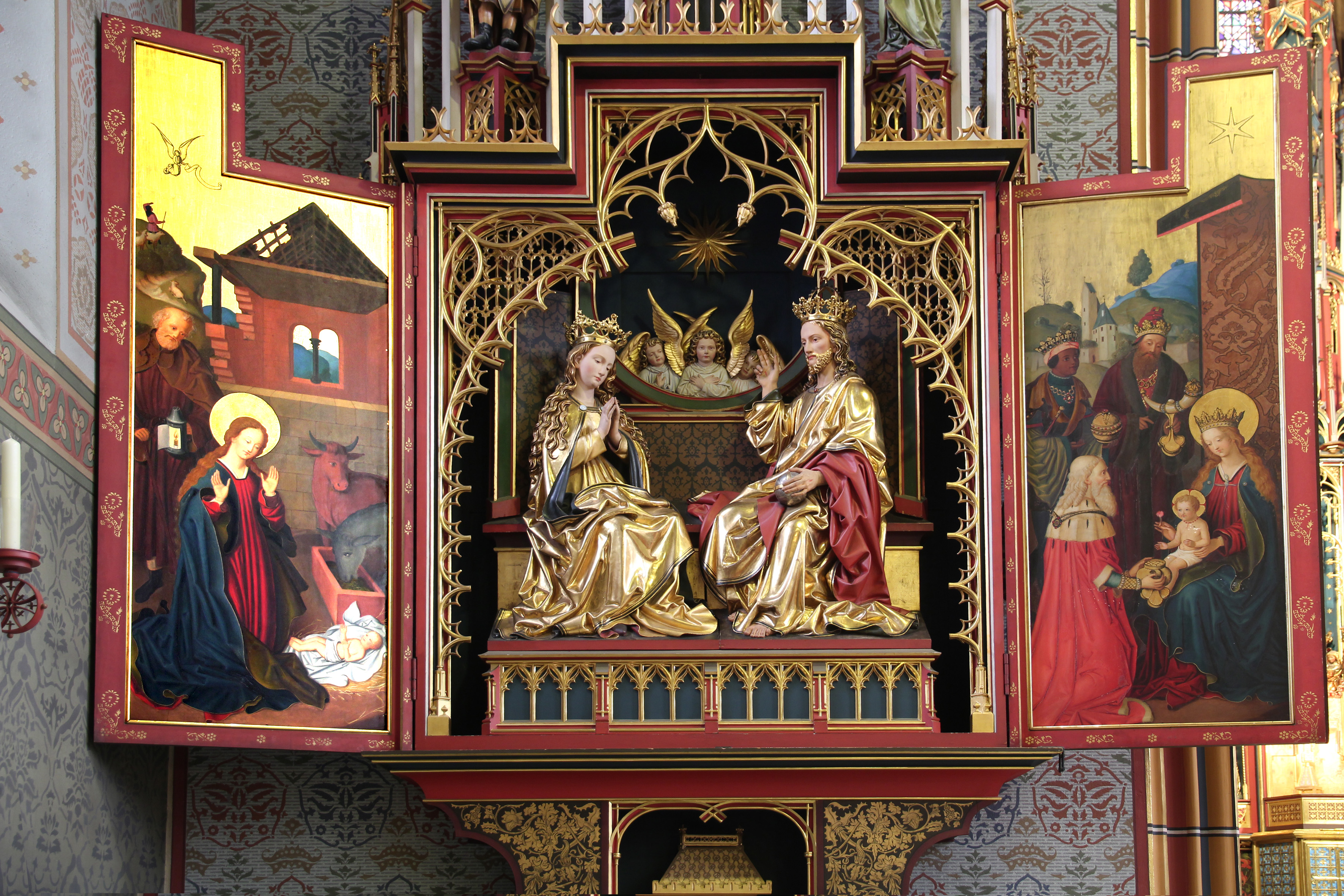 Römisch-katholische Pfarrkirche St. Peter und Paul Winterthur-Neuwiesen